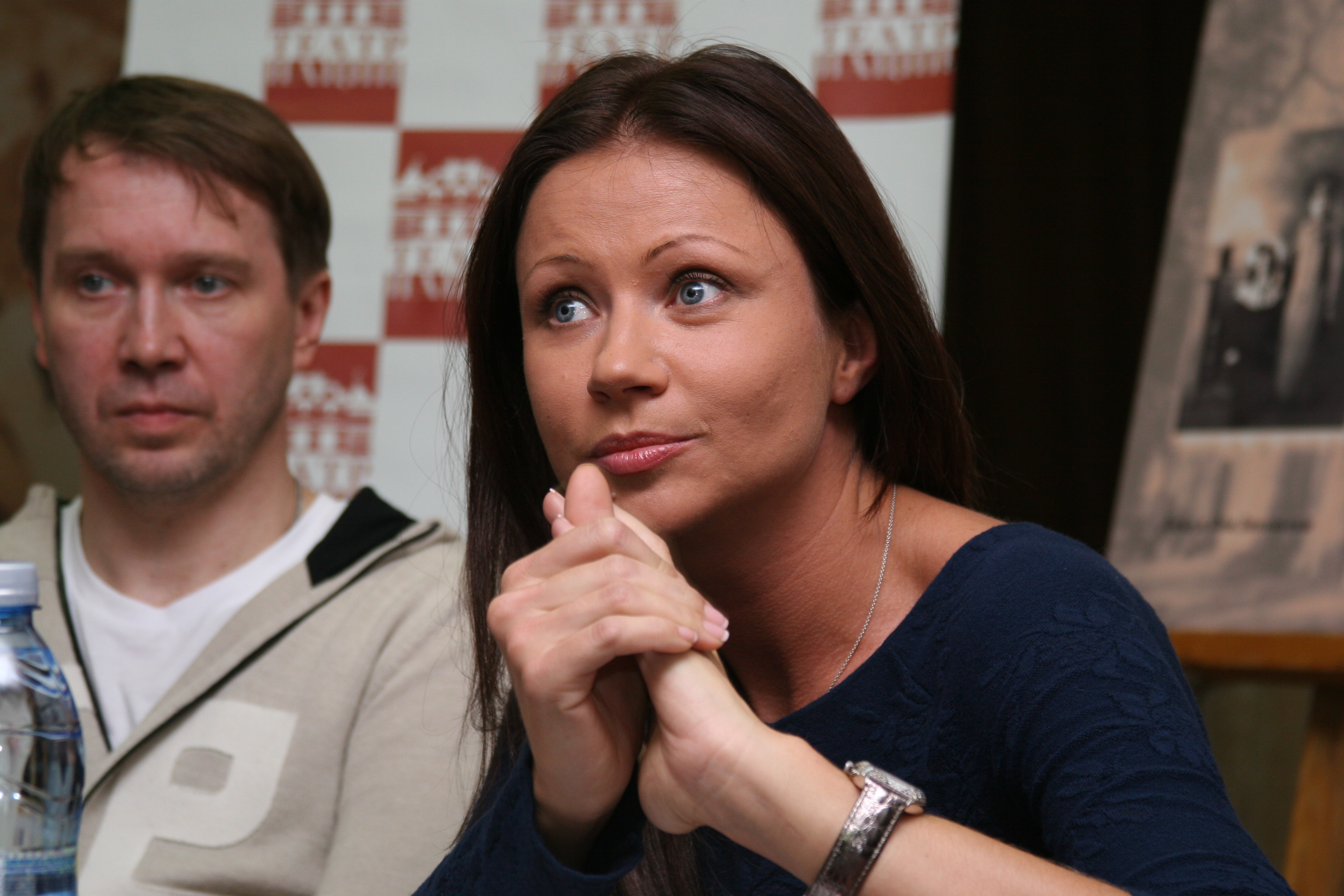 Российские звёзды Евгений Миронов и Мария Миронова на пресс-конференции в Саратовском театре драмы